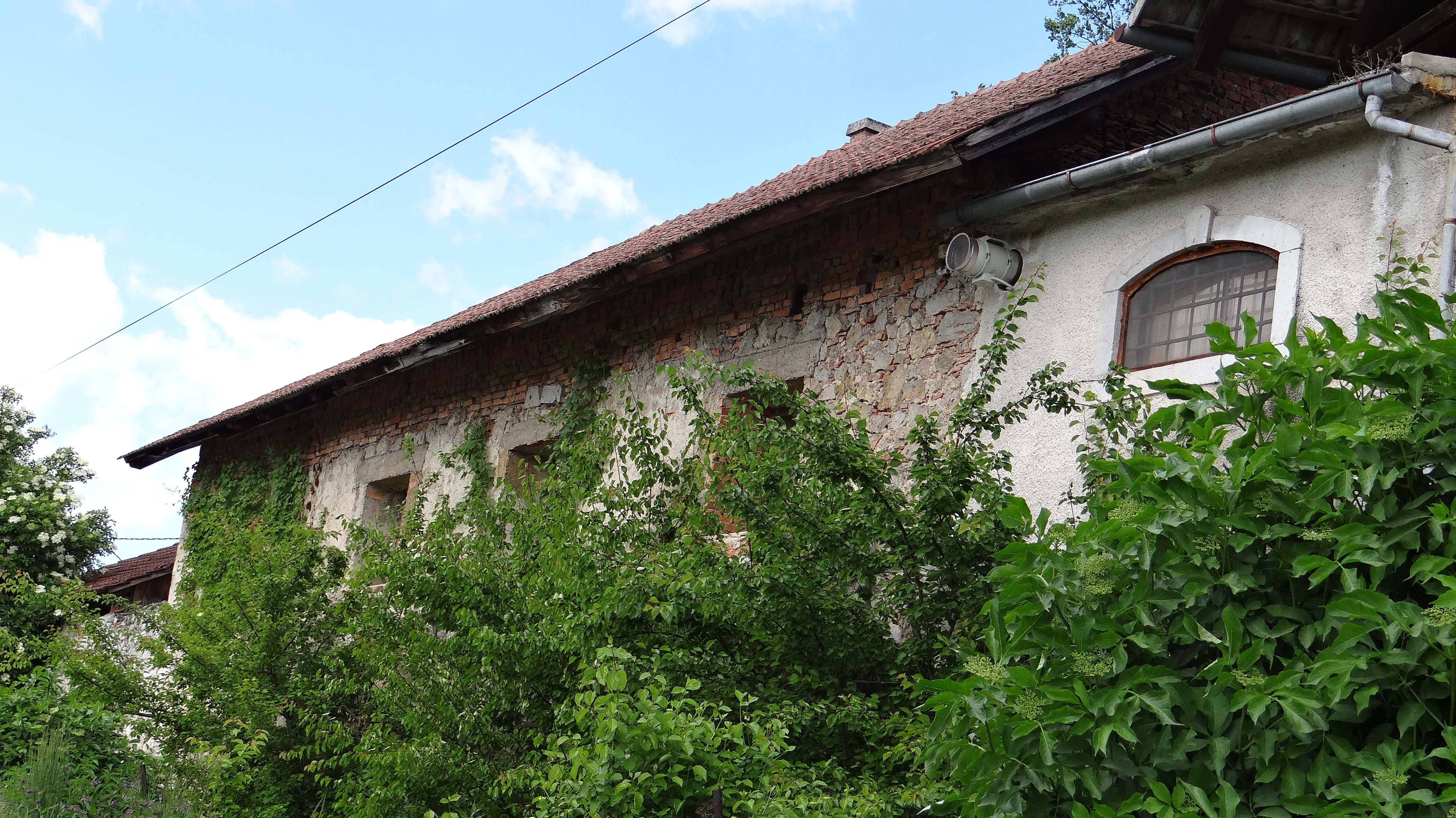 Ostanki dvorca Bajnof 2013